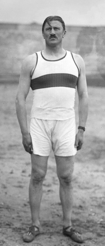 Émile Écuyer : [photographie de presse] / [Agence Rol]